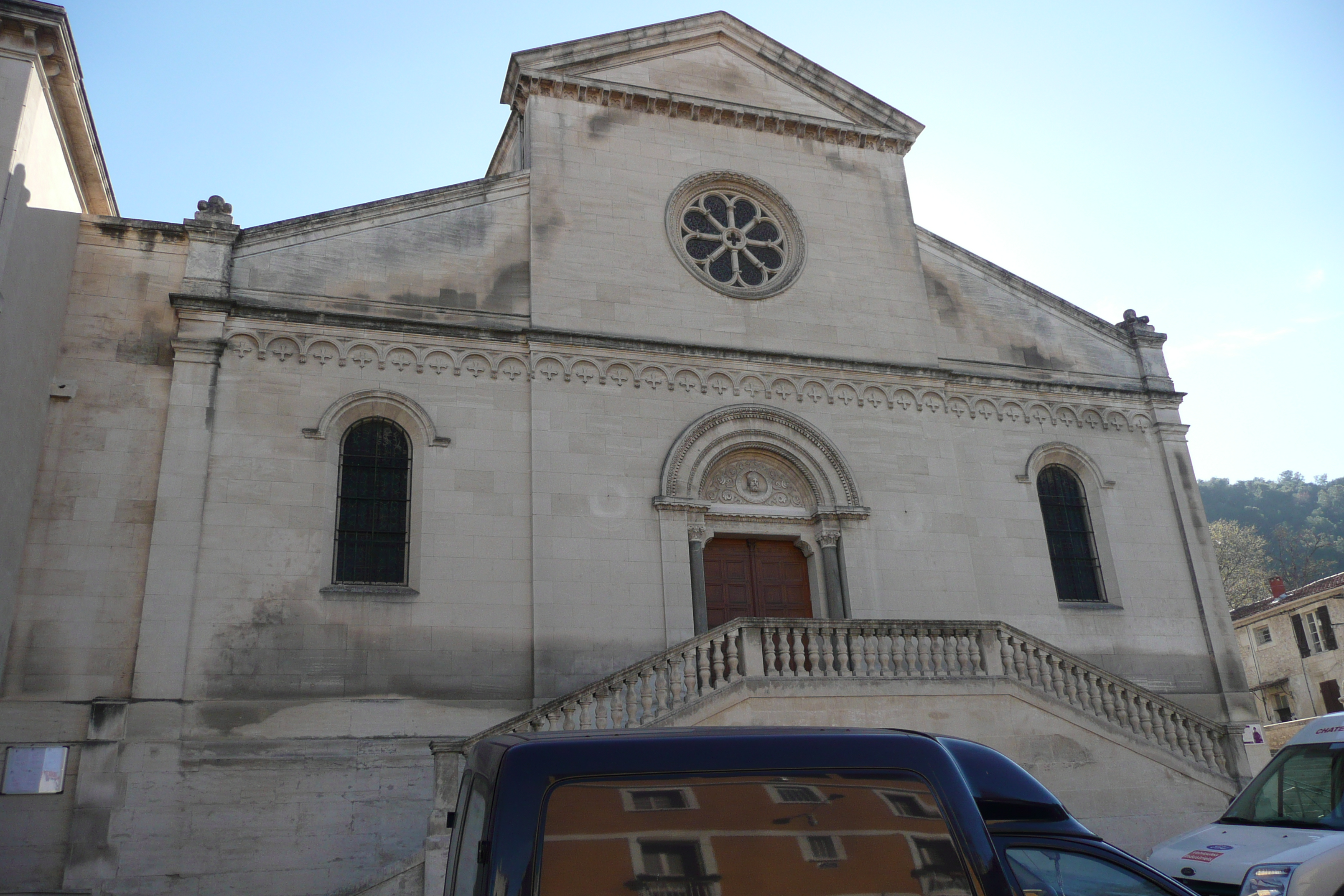 Eglise à Châteaurenard.